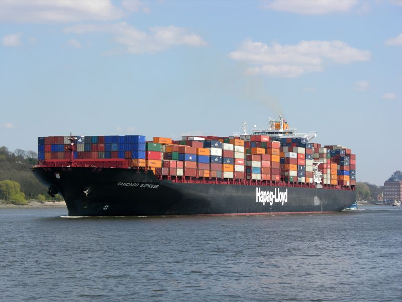 Das CMS CHICAGO EXPRESS der Hapag-Lloyd Aktiengesellschaft, Hamburg, auslaufend Hafen Hamburg.